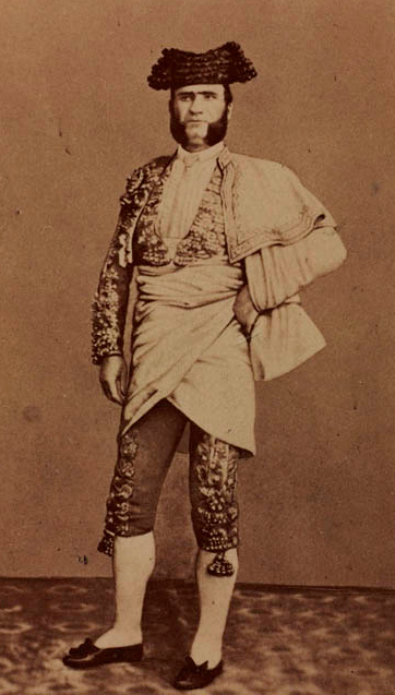 Fotografía de José Rodríguez y Rodríguez, Pepete, por Juan Laurent. Fotografía en papel albúmina; 89 x 55 mm, sobre cartulina 100 x 63 mm (carte de visite). Figura en cuerpo entero, de pie, con la montera calada y la muleta alrededor de la cintura, lleva largas patillas. Nota tit. y men. res: Impreso al verso, escudo real y a continuación: "J. Laurent./FOTOGRAFO DE S.M. LA REINA/y de S.S. A.A. R.R. los/SS. INFANTES DE ESPAÑA/39. Carrera de S. Gerónimo/MADRID"